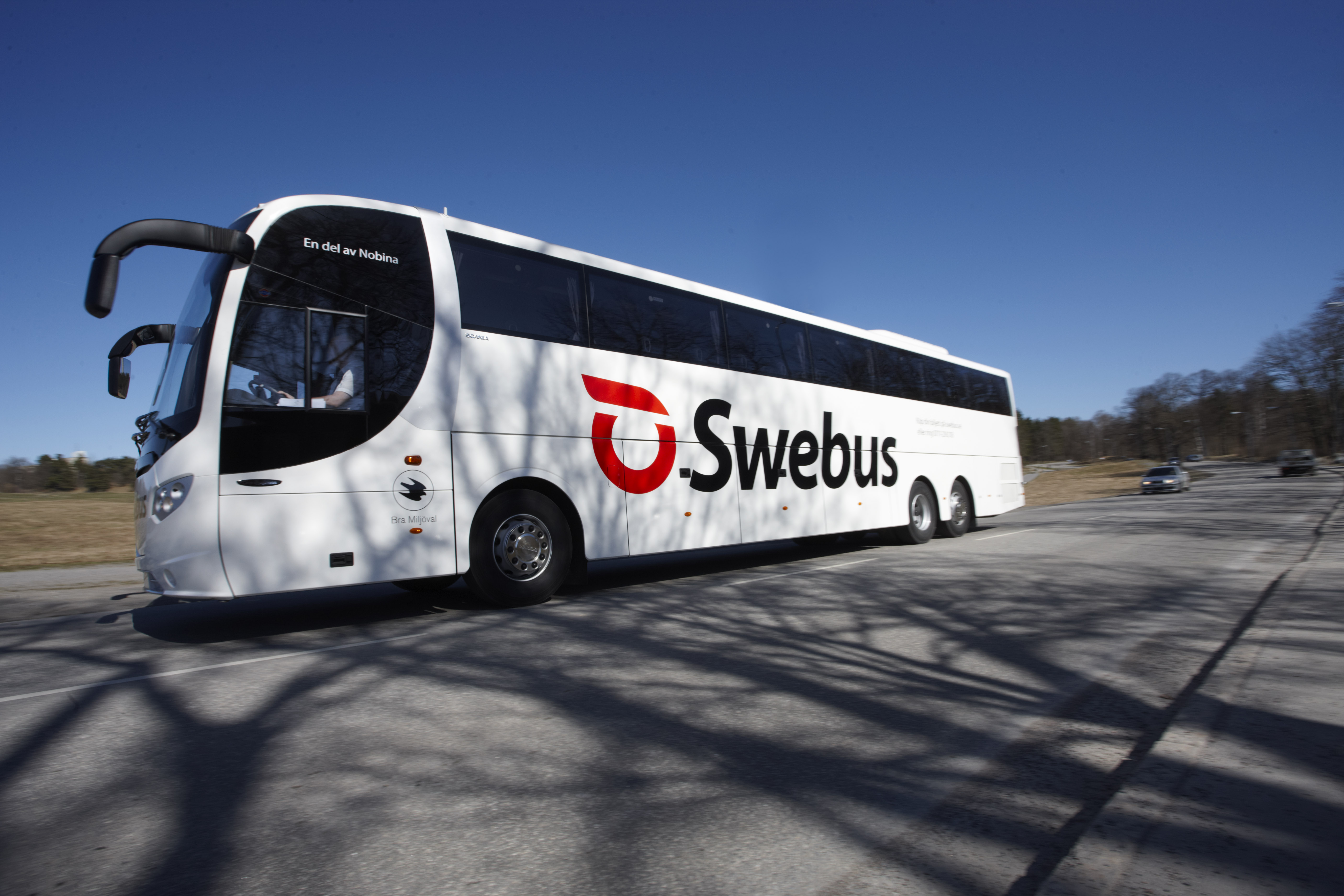 Swebus nya buss på landsväg i Sverige